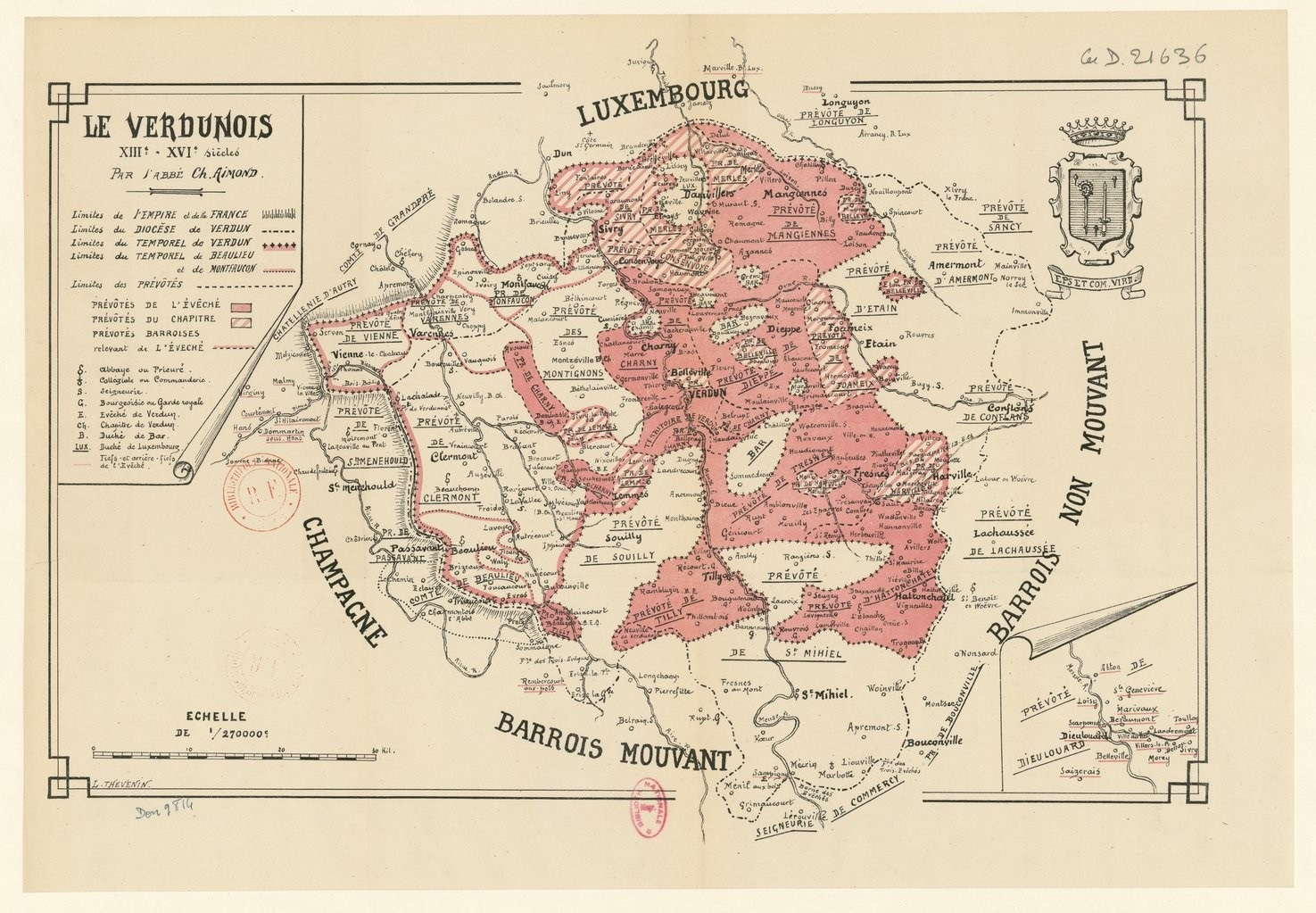 Le Verdunois, XIIIème-XVIème siècle. This image comes from Gallica Digital Library and is available under the digital ID btv1b530576583 This tag does not indicate the copyright status of the attached work. A normal copyright tag is still required. See Commons:Licensing.